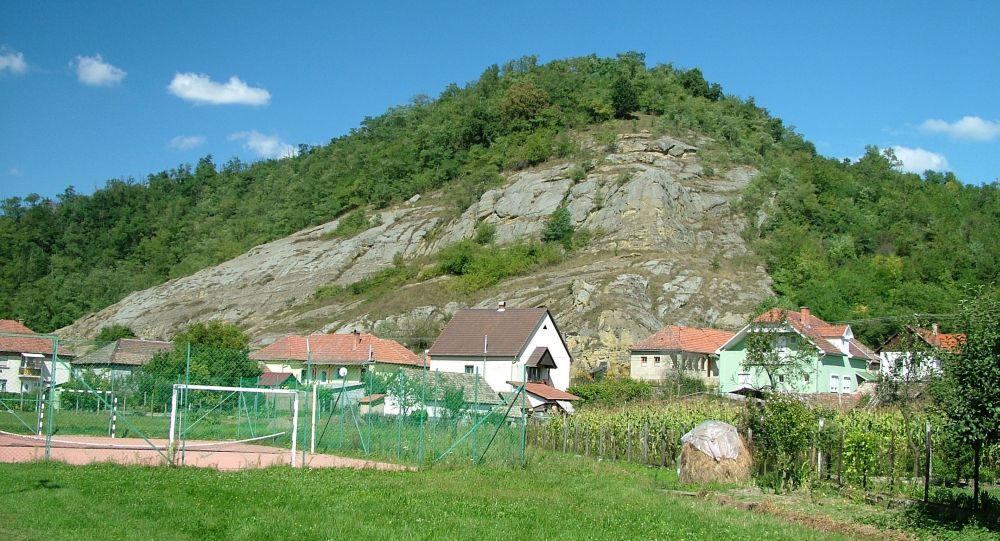 A Noé szőlője nevű sziklaképződmény Istenmezején